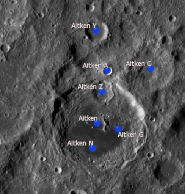 Cráter lunar Aitken. Cráteres satélite. (Imagen LRO)